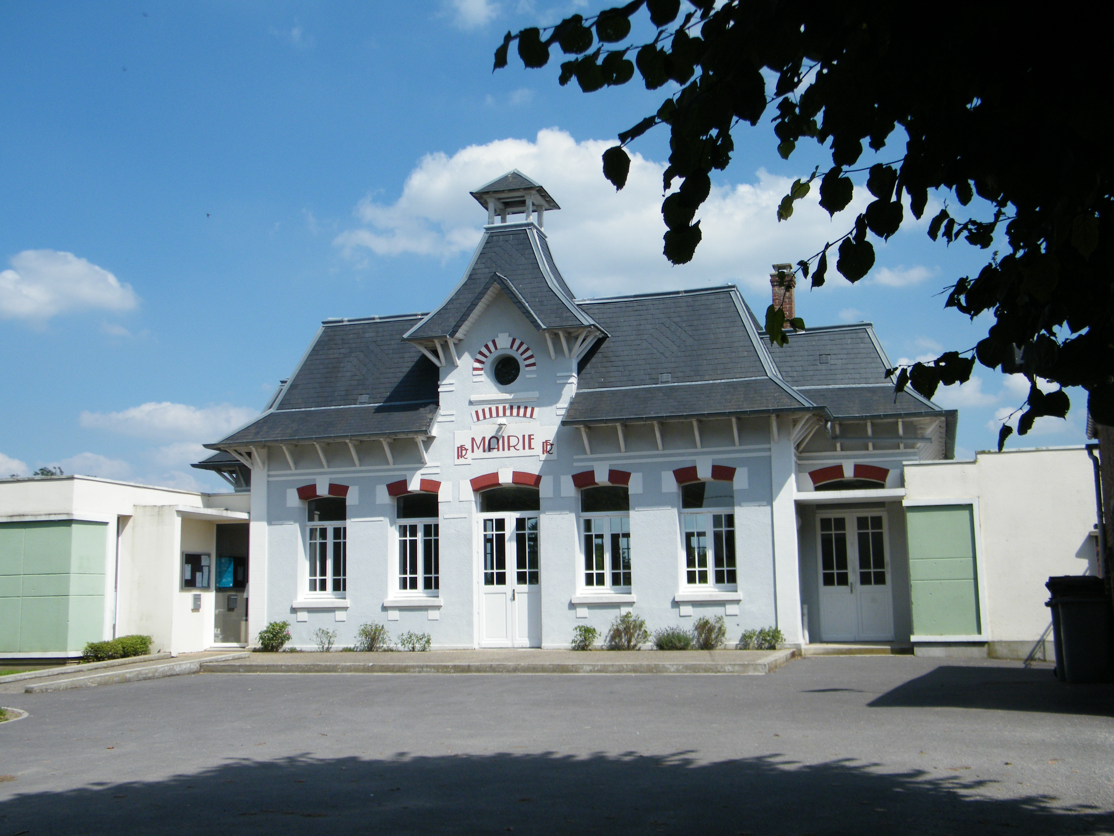 Mairie.